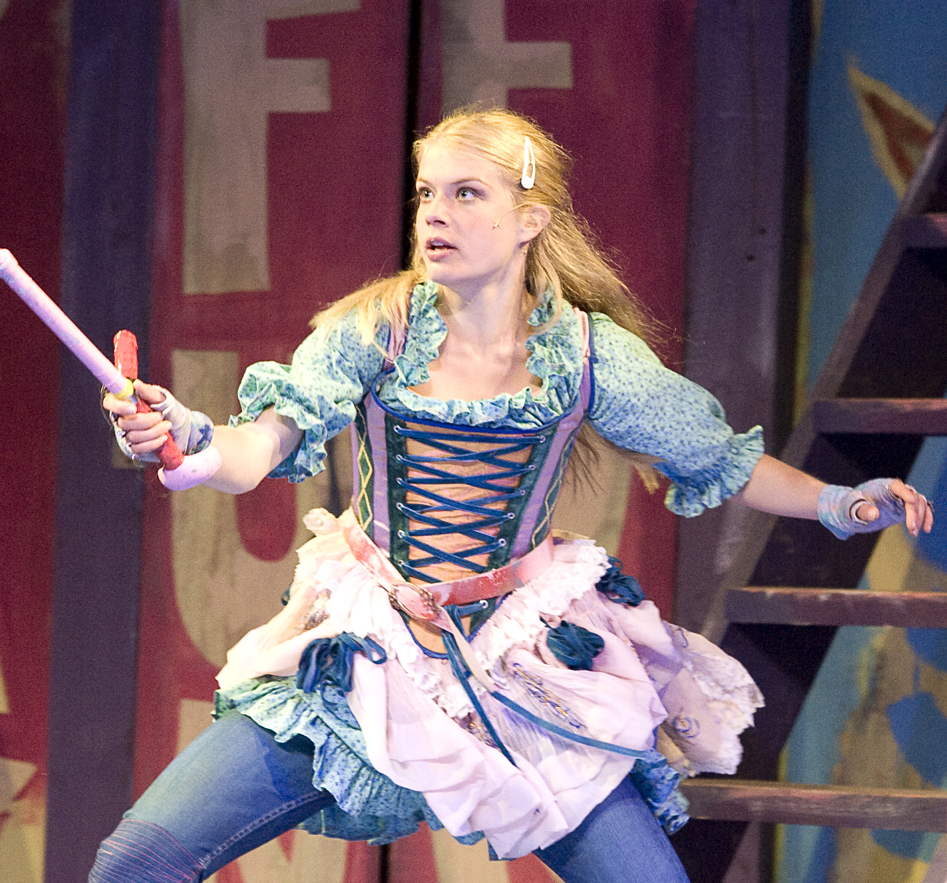 Leena - Alina Tomnikov Kuva: Ryhmäteatteri / Tanja Ahola